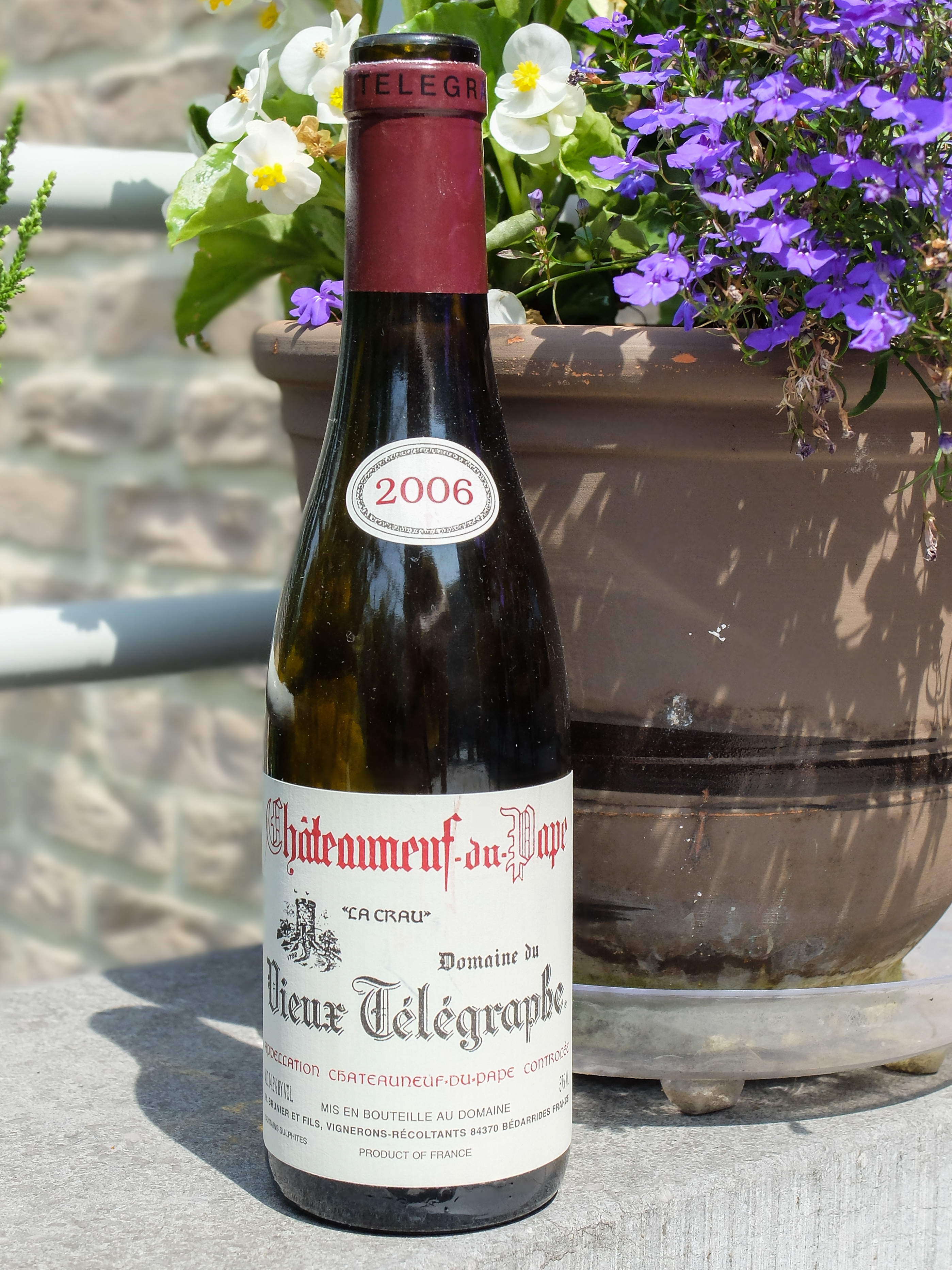 2006 Châteauneuf-du-Pape Vieux Telegraphe "La Crau"